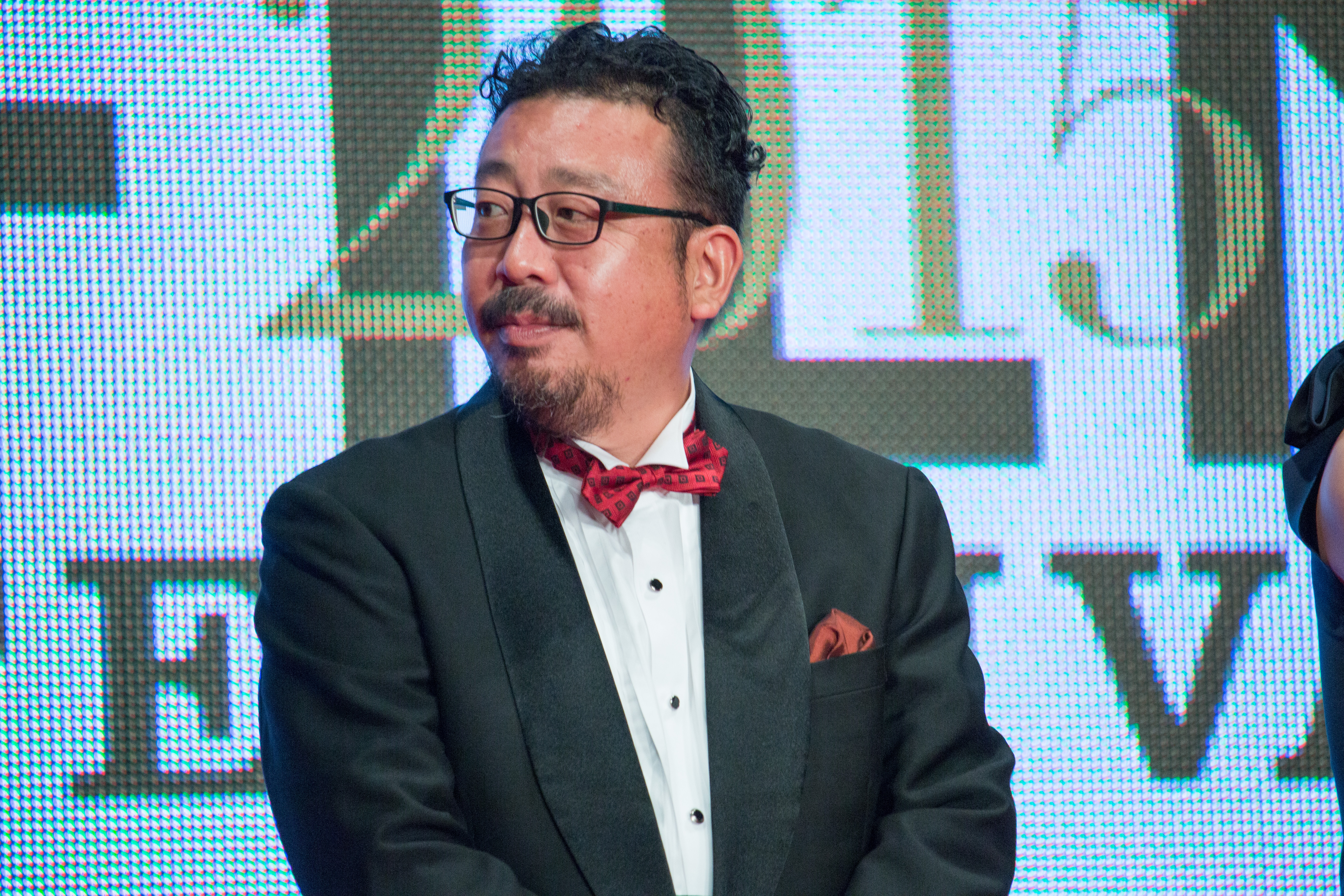 第28回 東京国際映画祭 オープニングセレモニー 中村義洋 (残穢 -住んではいけない部屋-)